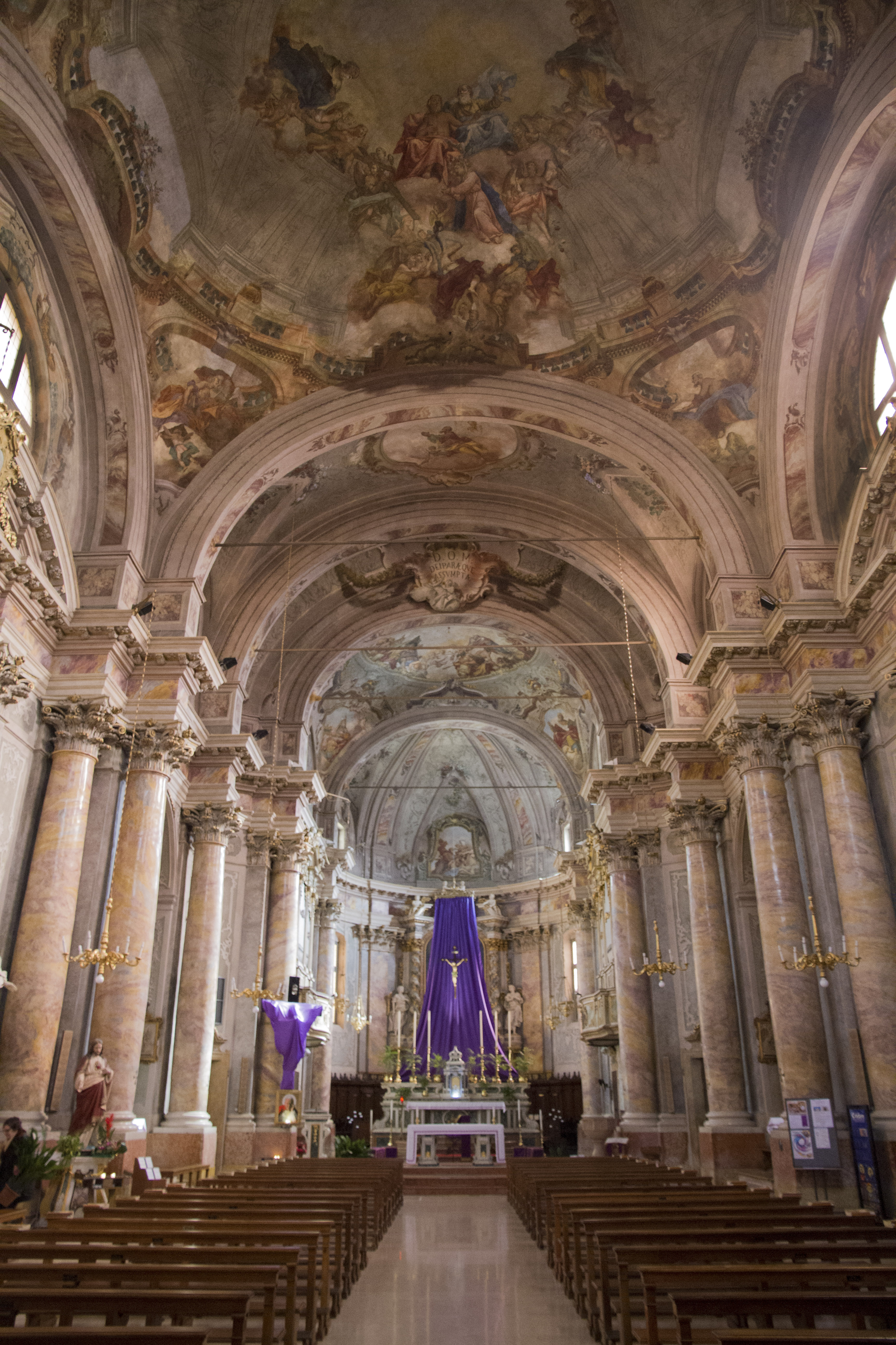 Interno caratteristico della Chiesa parrocchiale di Santa Maria Assunta di Vobarno che sottolinea le forme arrotondate della chiesa.